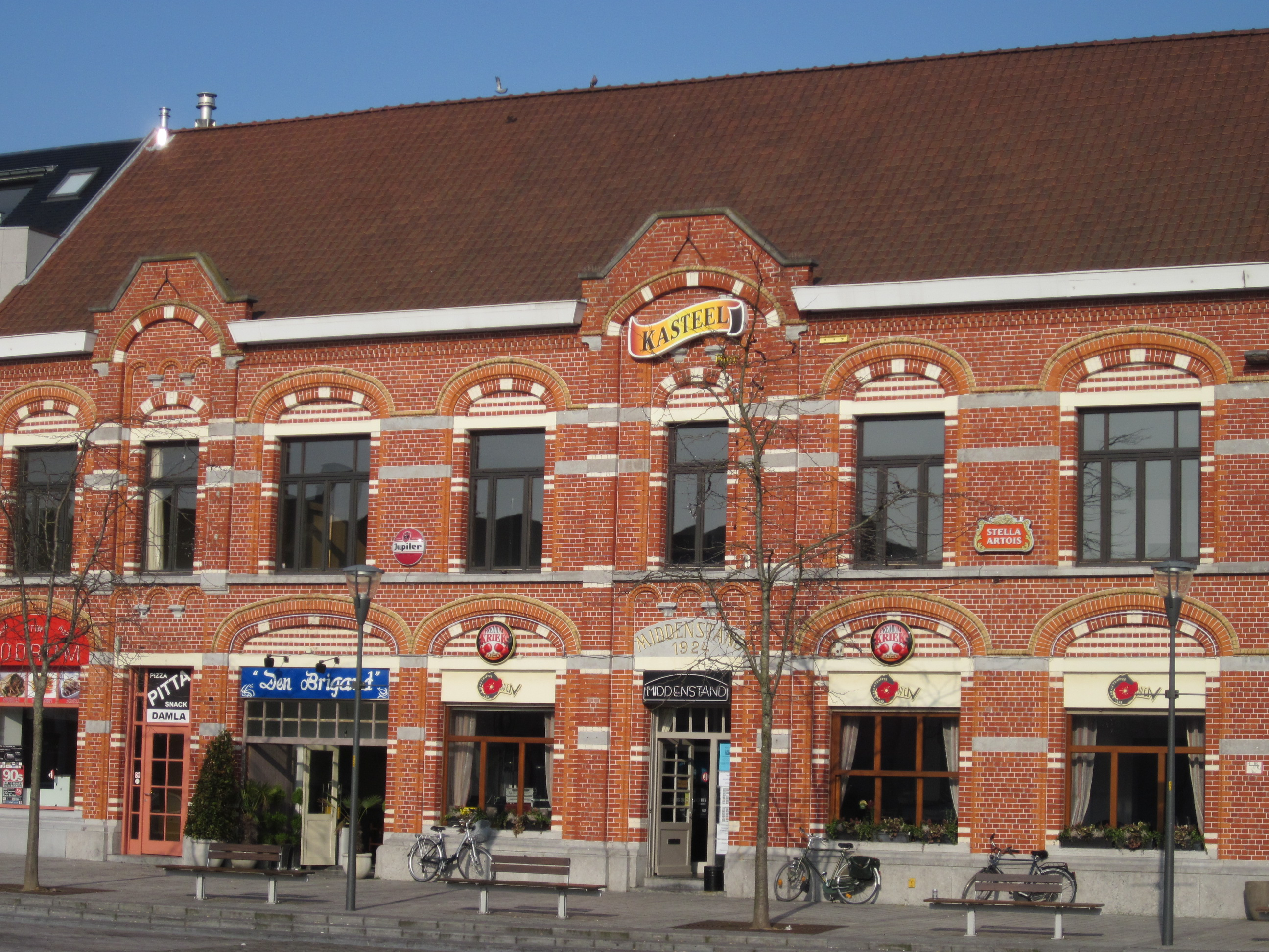 Café 'De Middenstand' met feestzaal 'Den Brigand' (1924), Marktplein , Kuurne 91″ N, 3° 17′ 14.64″ E